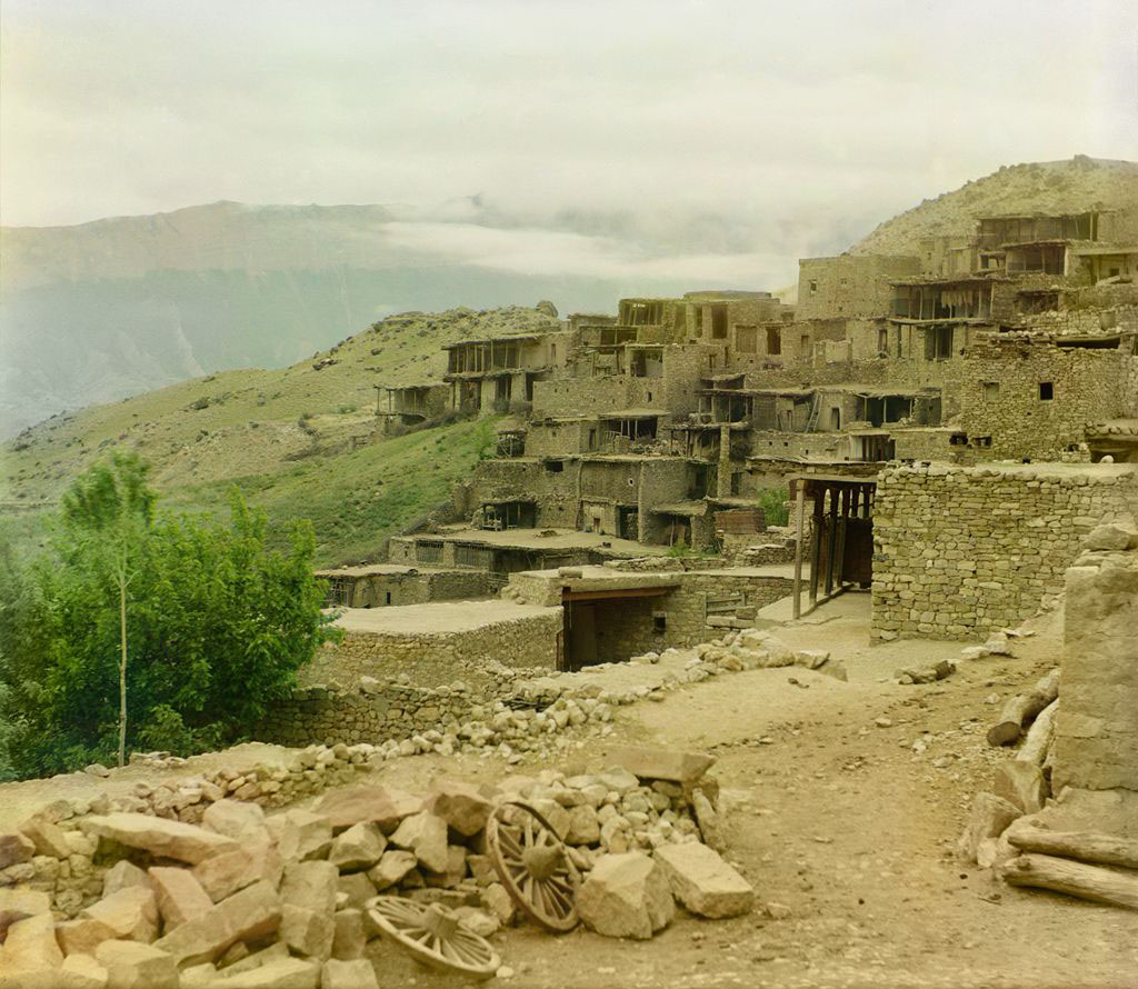 Cовременная цифровая реконструкция цвета. Реставратор: Ростовский Государственный Университет